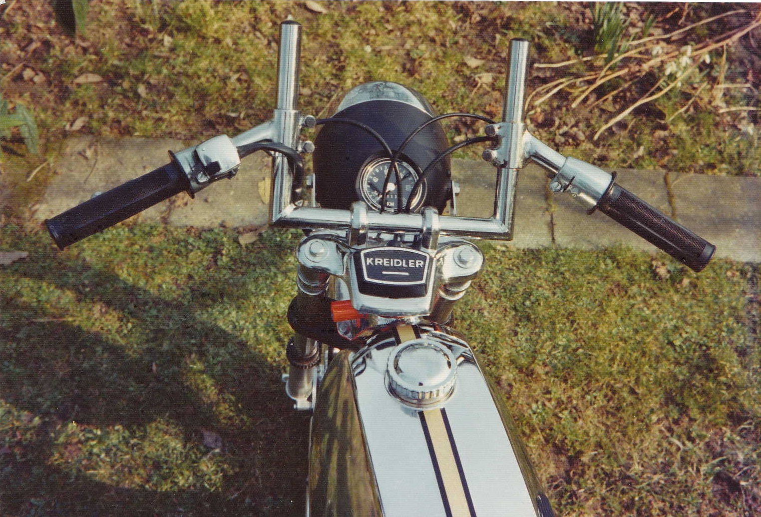 Forkromet Kreidler del